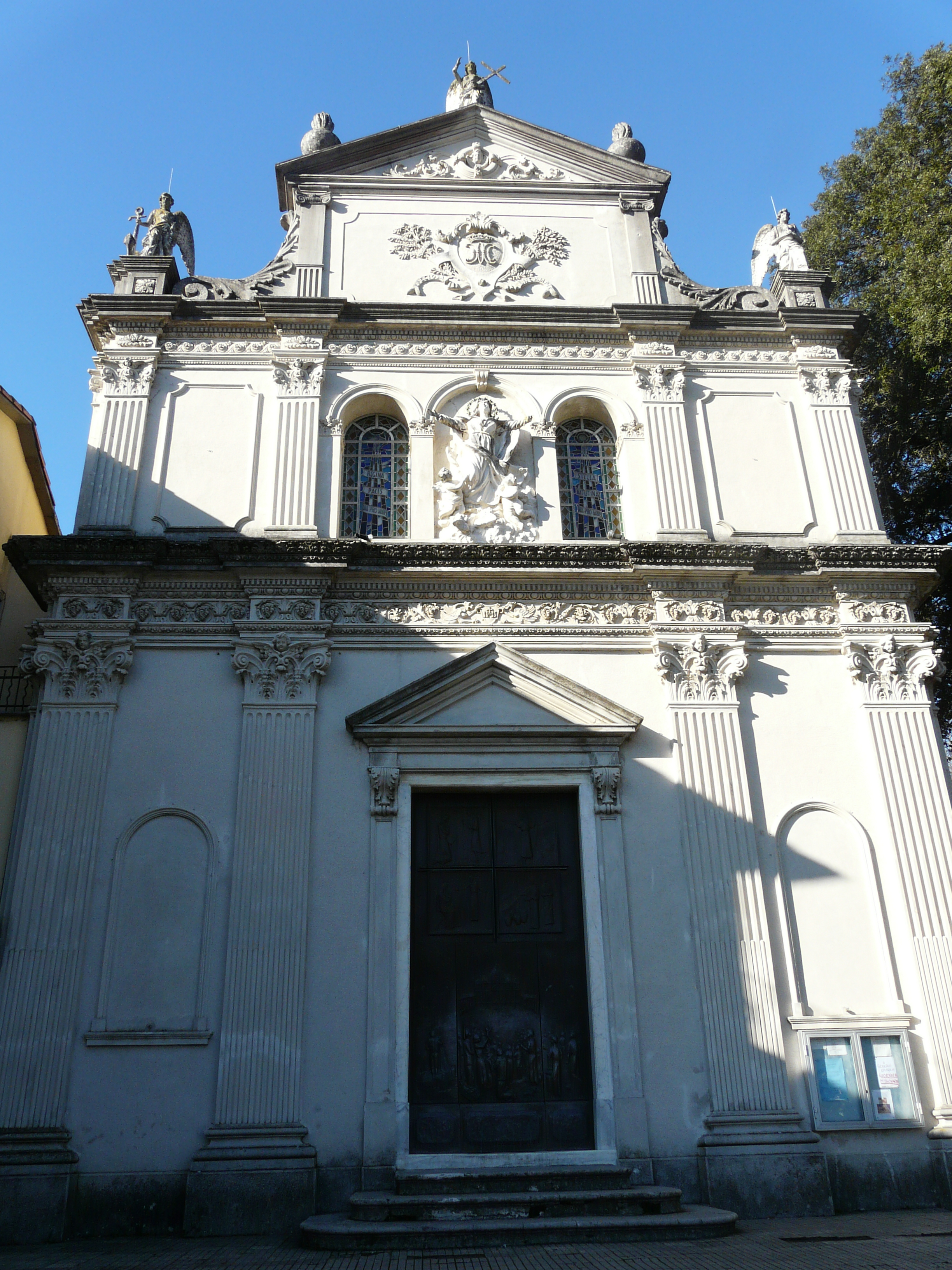 Chiesa di Nostra Signora Assunta, Santa Maria del Campo, Rapallo, Liguria, Italia